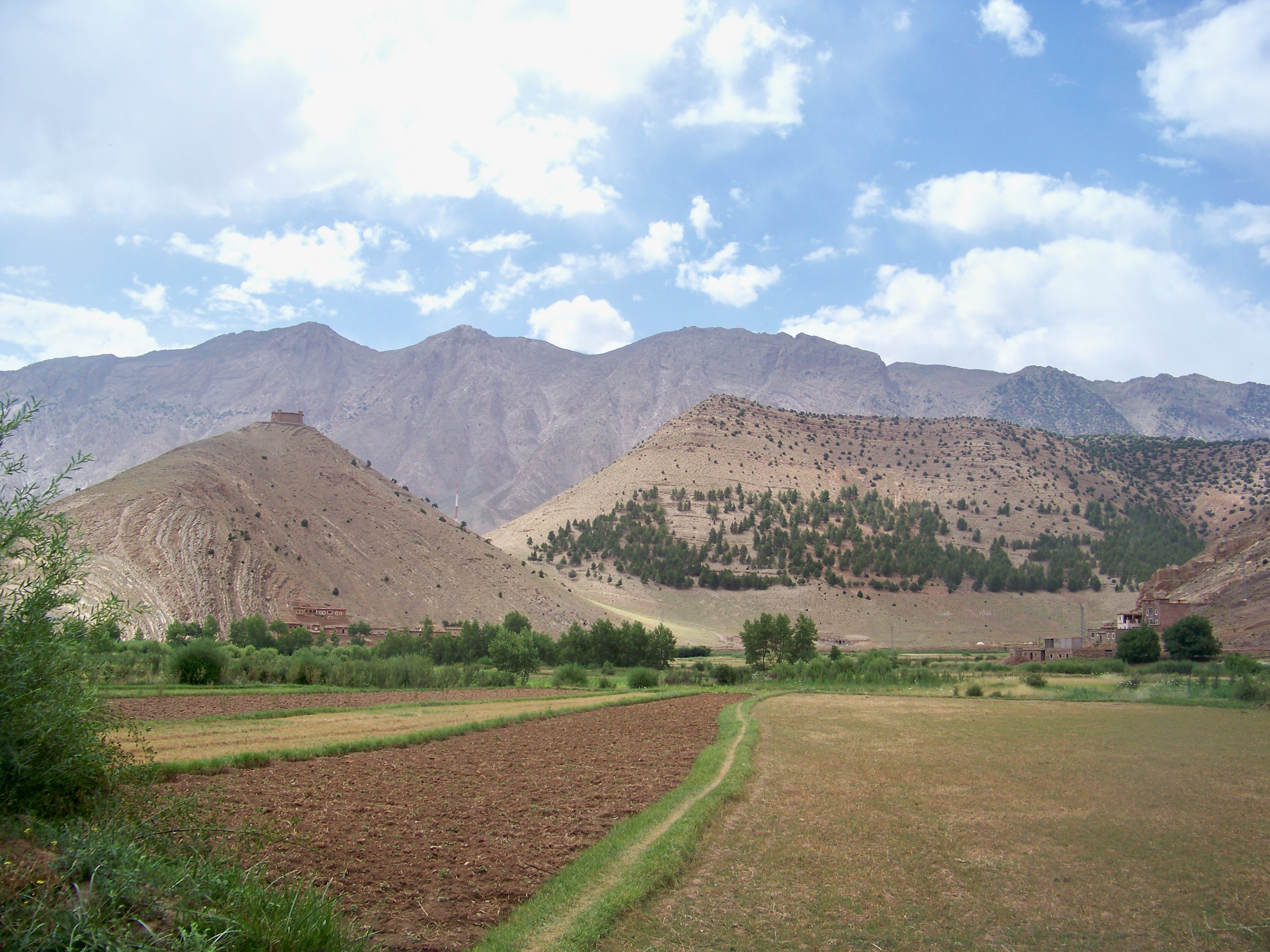 Aït Bouguemez, Maroc